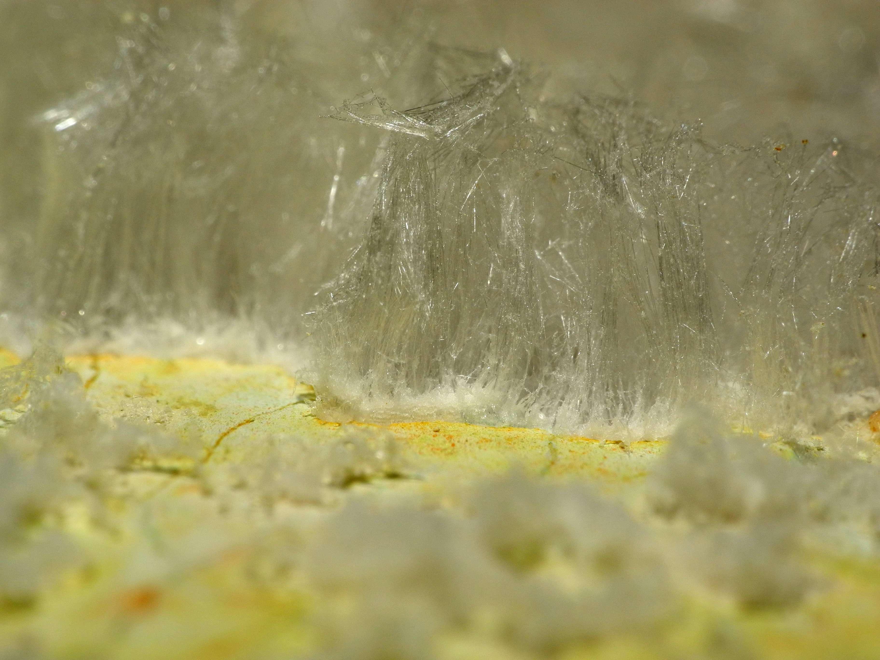 Salpêtre (nitrate de potassium), sur un mur. Image prise avec la bonnette Raynox DCR-250.